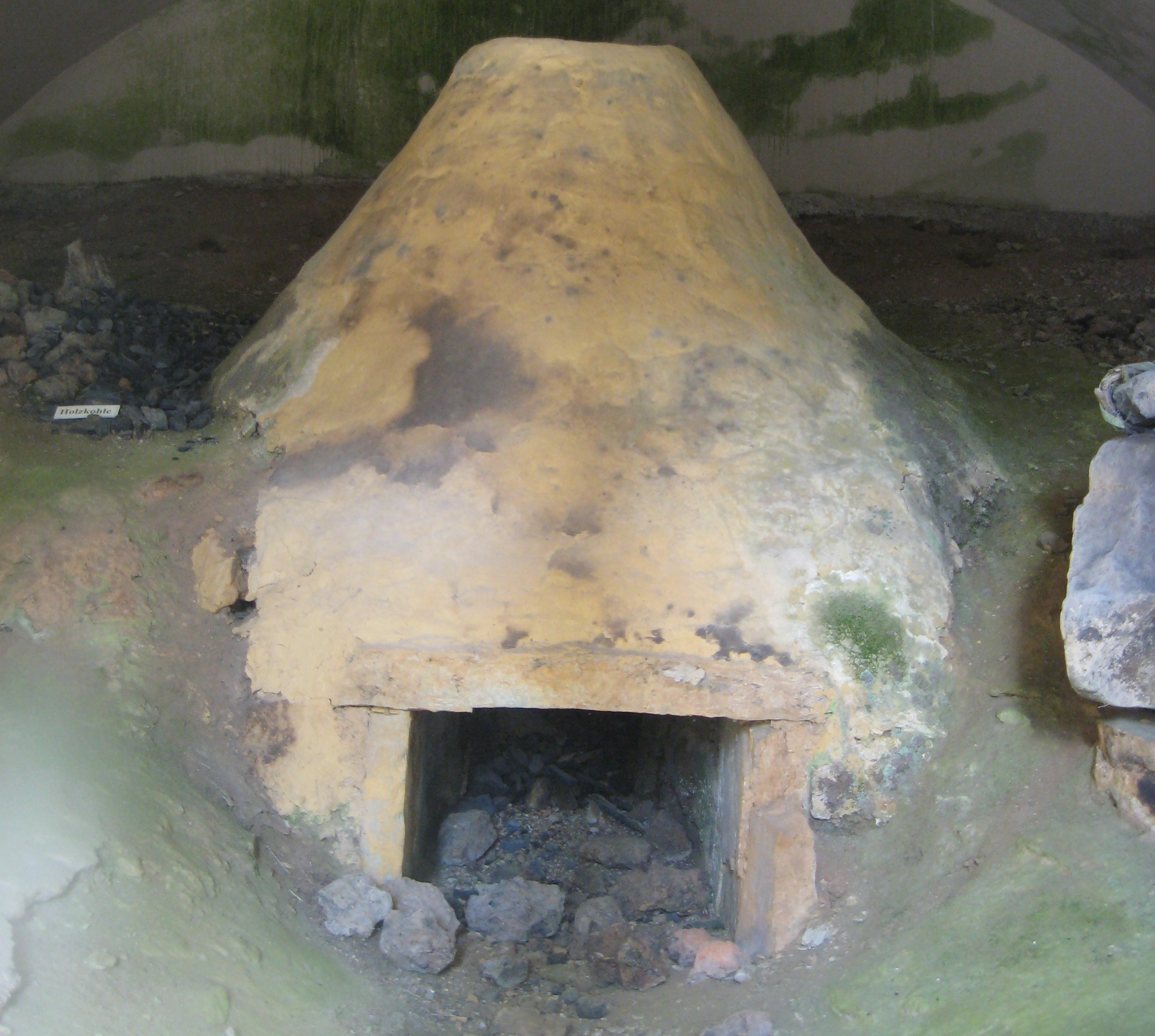 Restaurierter Ofen aus der La-Tene-Zeit bei Wilnsdorf-Obersdorf, Zeugniss des 2500-jährigen siegerländer Bergbau.